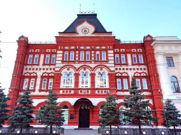 Здание банка: улица Гостиная, 6, Орёл, Орловская область